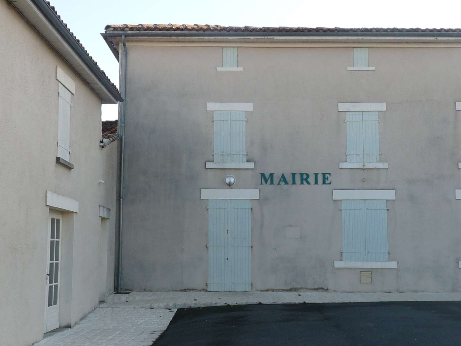 mairie du Tâtre, Charente, France